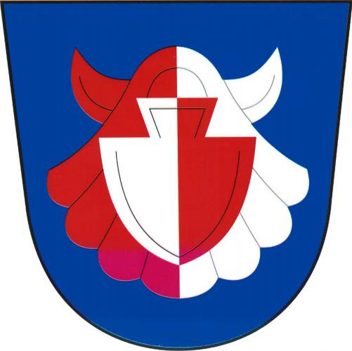 znak, Oráčov, okres Rakovník